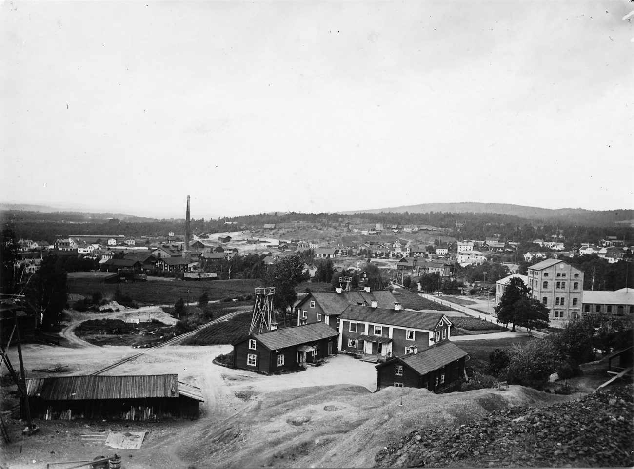 B1035 Kafveltorps bergverk i Västmanland. Utsikt från Katarinas lave.